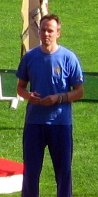 Vesa Rantanen Kalevan kisoissa, Ratinan stadionilla, Tampereella, 26. heinäkuuta 2008